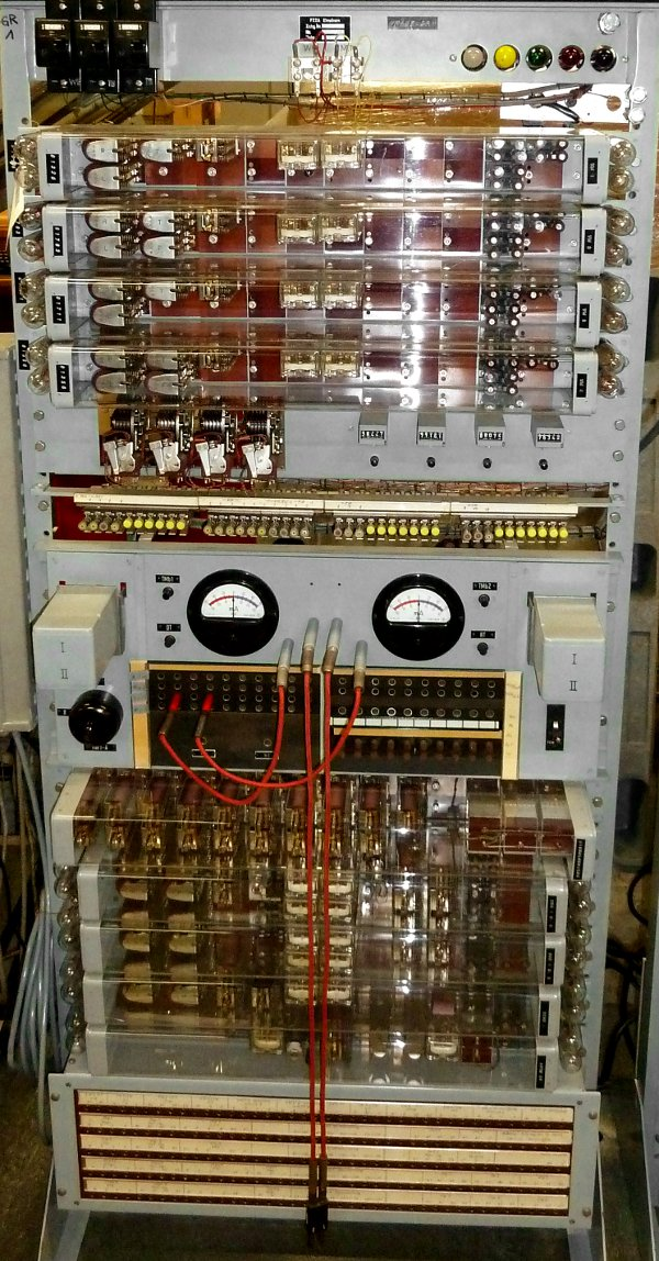 Das Bild zeigt einen Gestellrahmen aus dem Teilnehmer-Wählfernschreibnetz TW 39, mit Vorwähler und Übertragung.